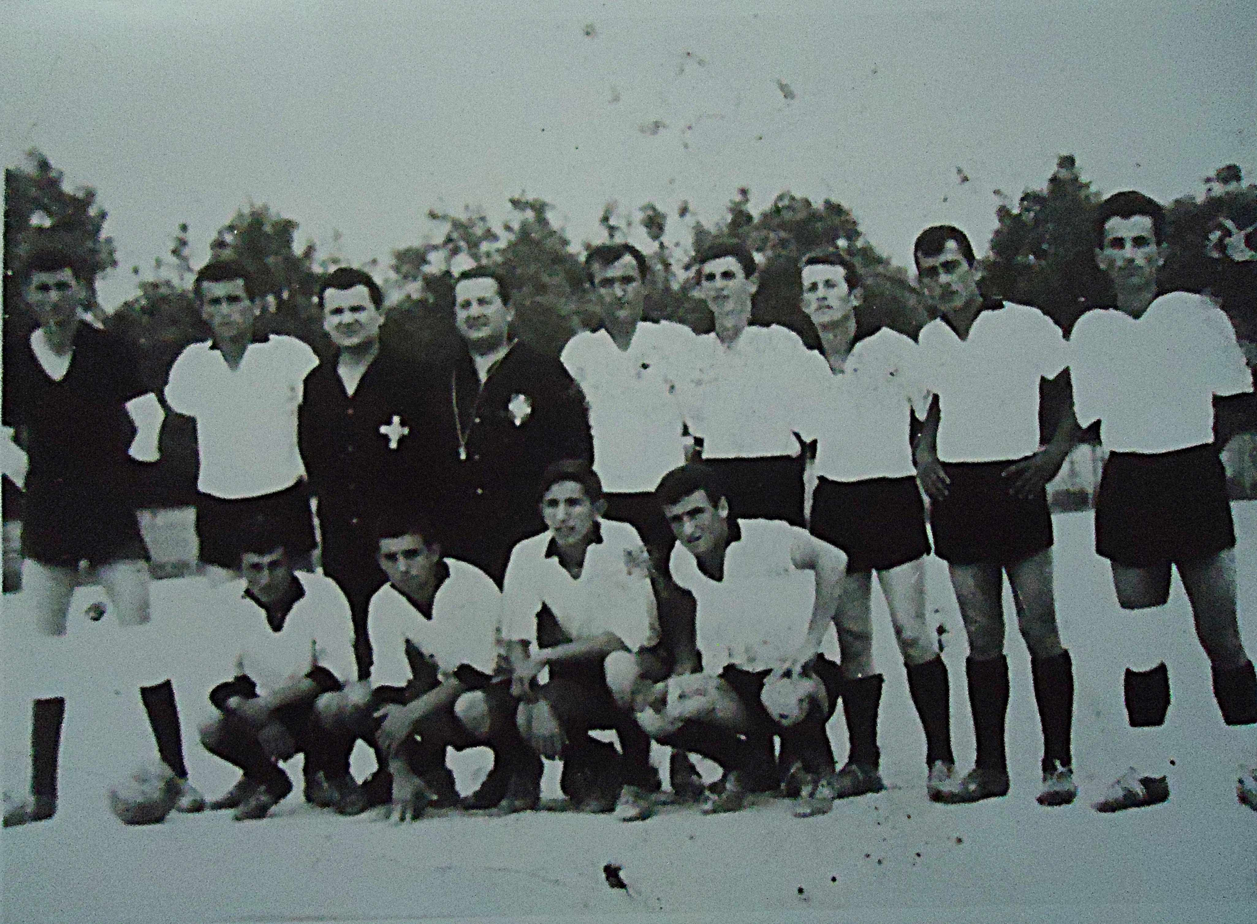 Παλαιά φωτογραφία της ομάδας του Ατρομήτου Γαβριάς.